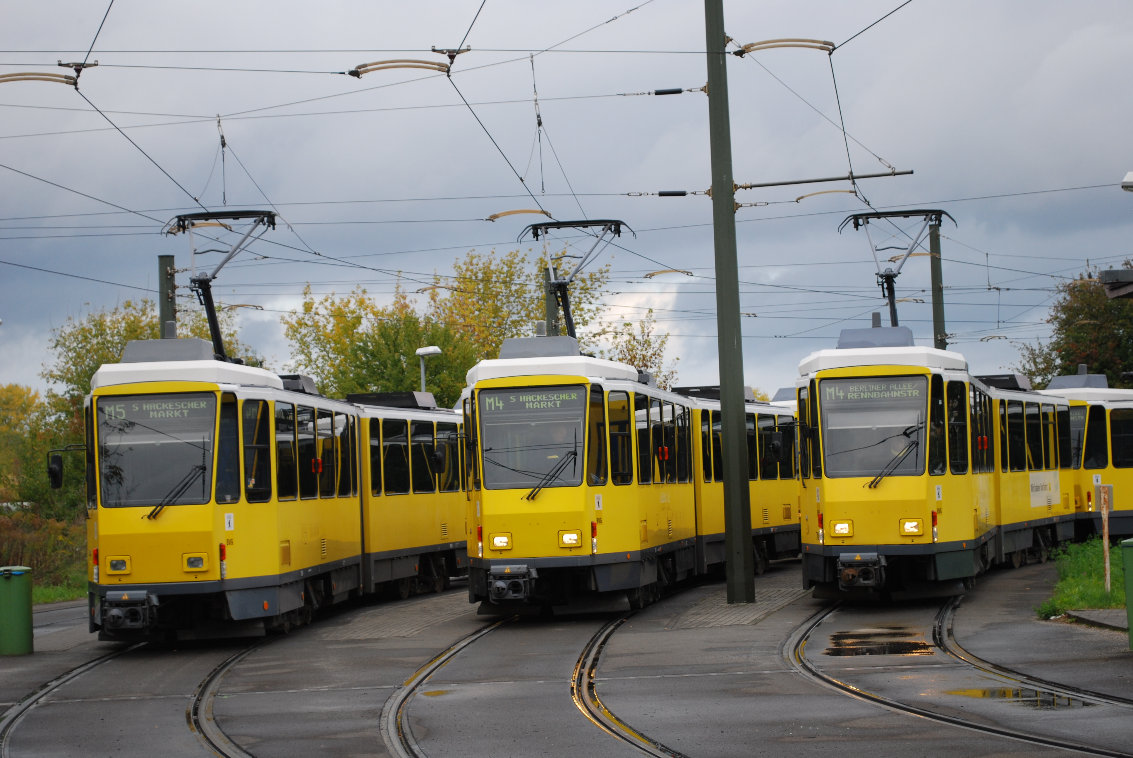 3 Tatra-strassenbahnen an die Endhaltestelle in Zingster strasse, Hohenschönhausen, Berlin